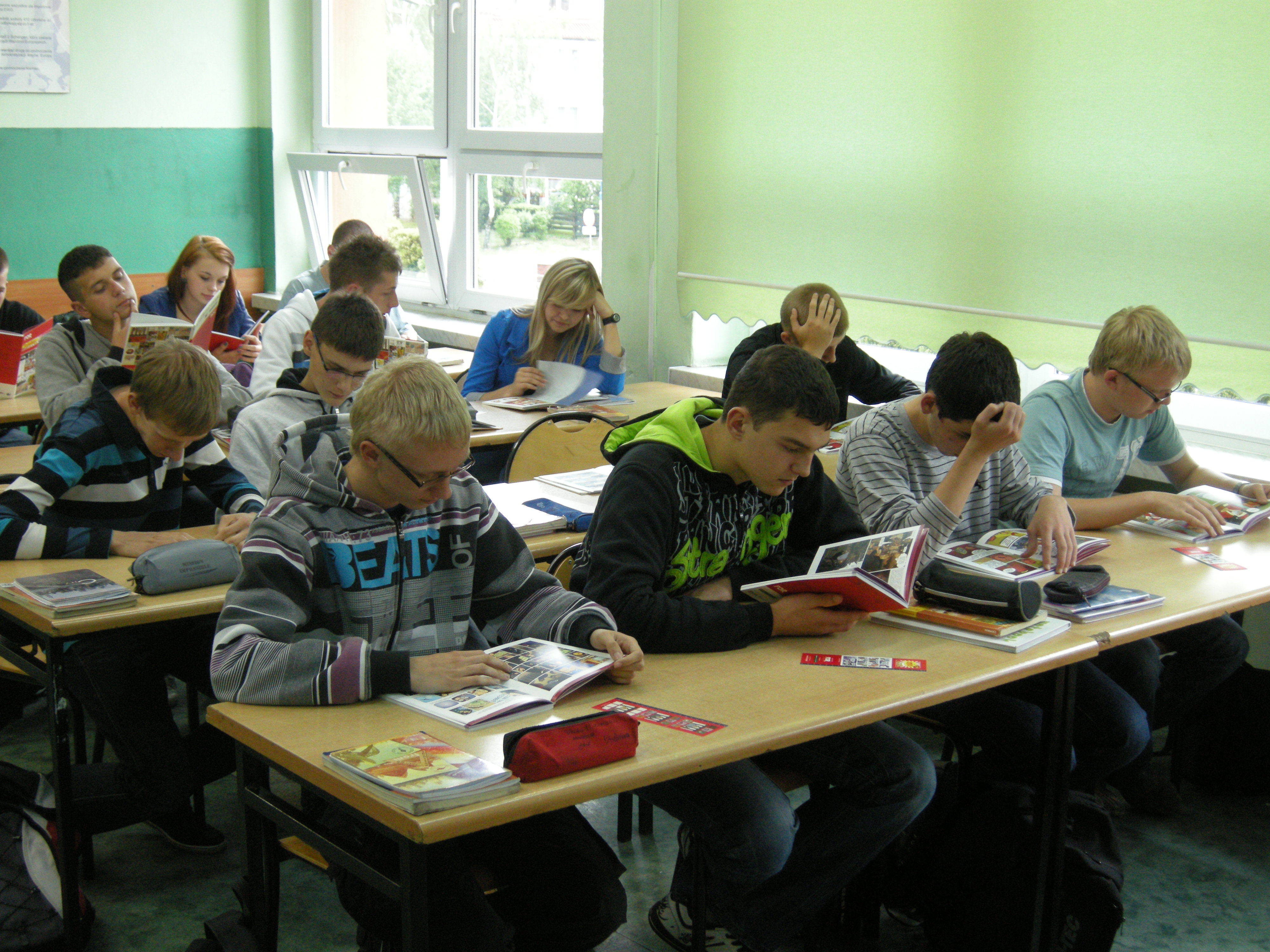 "Komiksy ekonomiczne" w jednej ze szkół